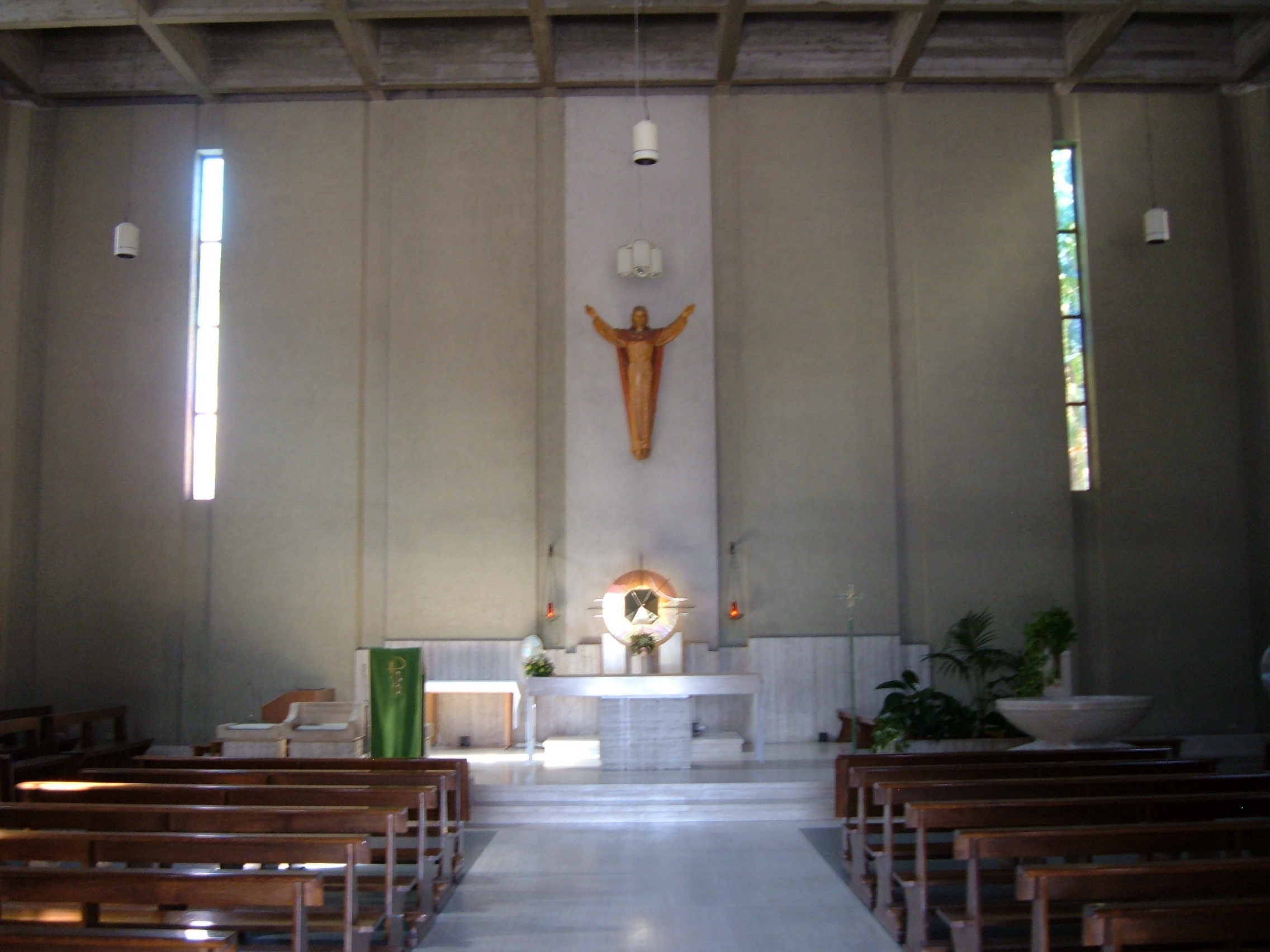 Chiesa di San Gregorio Magno, a Roma, nel quartiere Portuense.